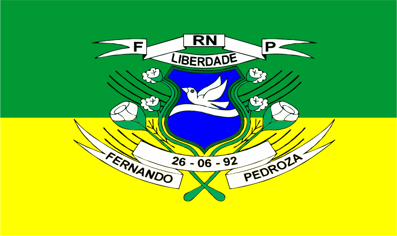 Bandeira